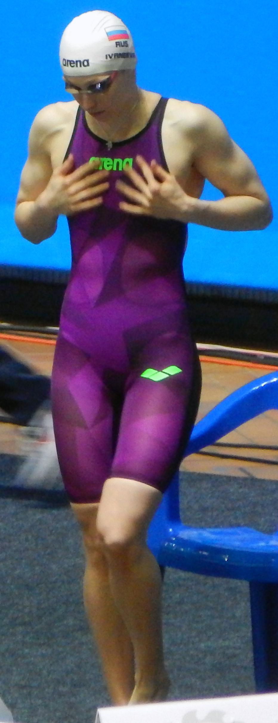 Наталья Иванеева на чемпионате России по плаванию 2018